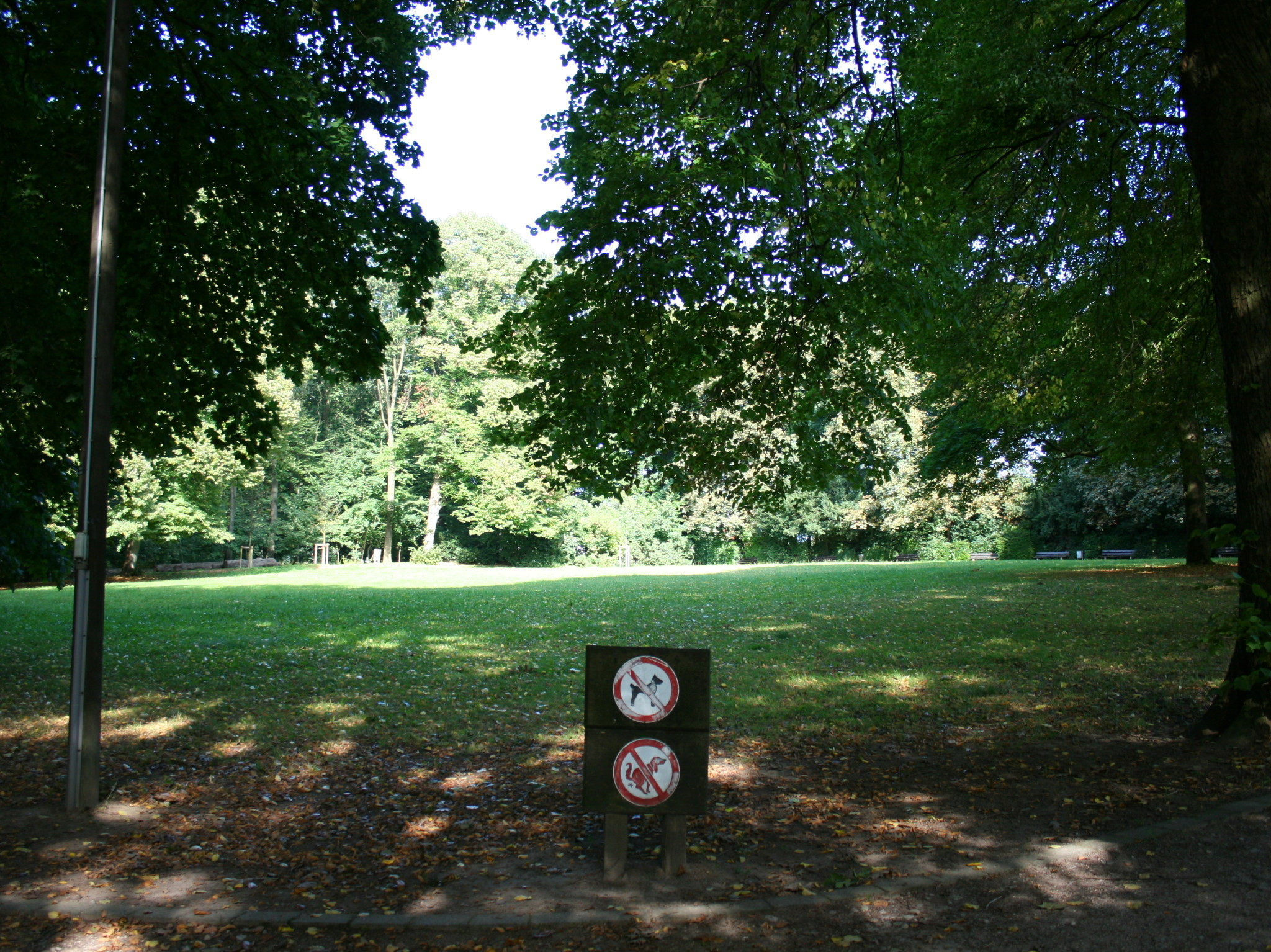 Wuppertal-Ronsdorf: Ronsdorfer Anlagen